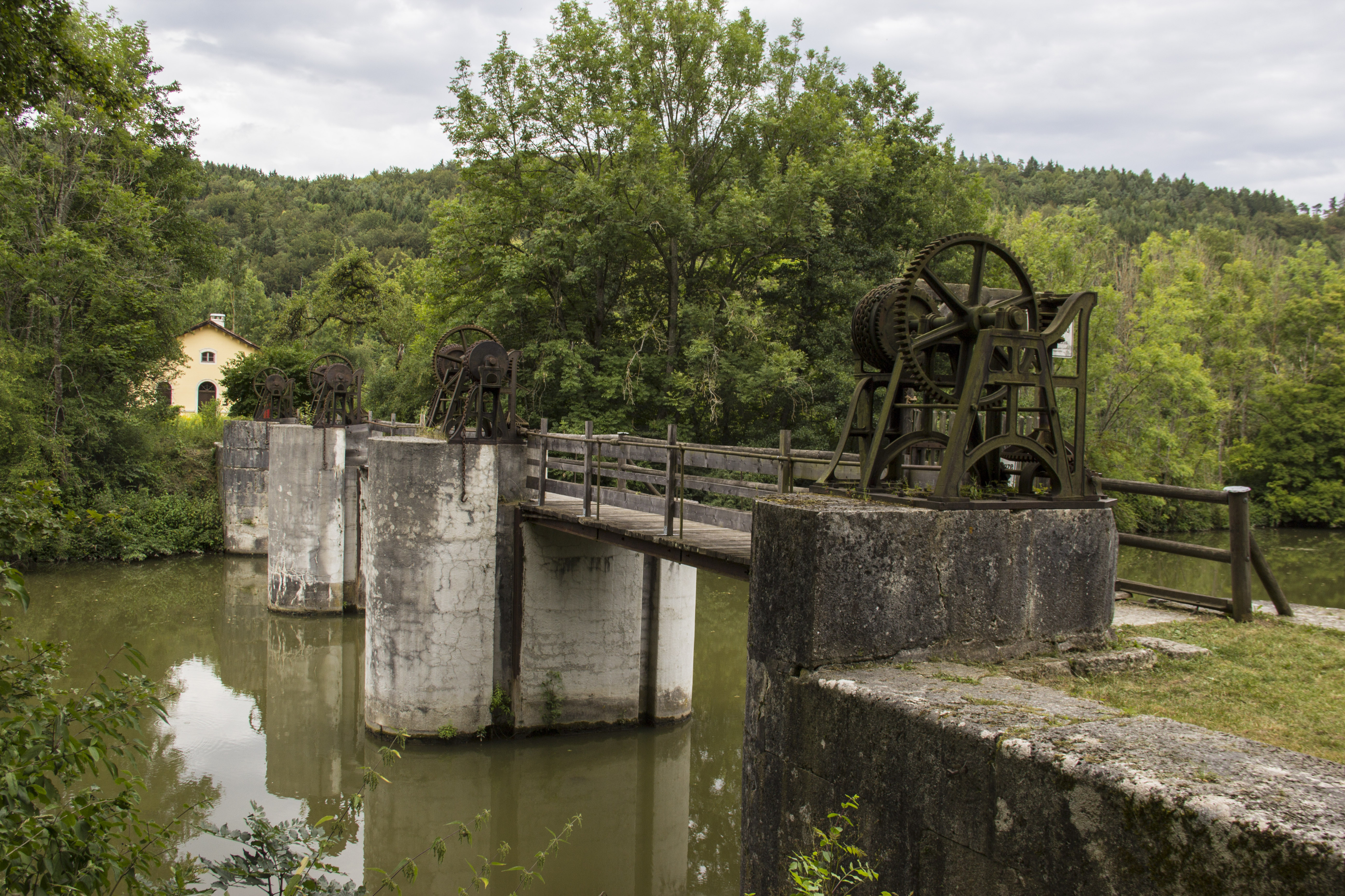 Ludwig-Donau-Main-Kanal, Schleuse 5, Riedenburg, Nusshausen